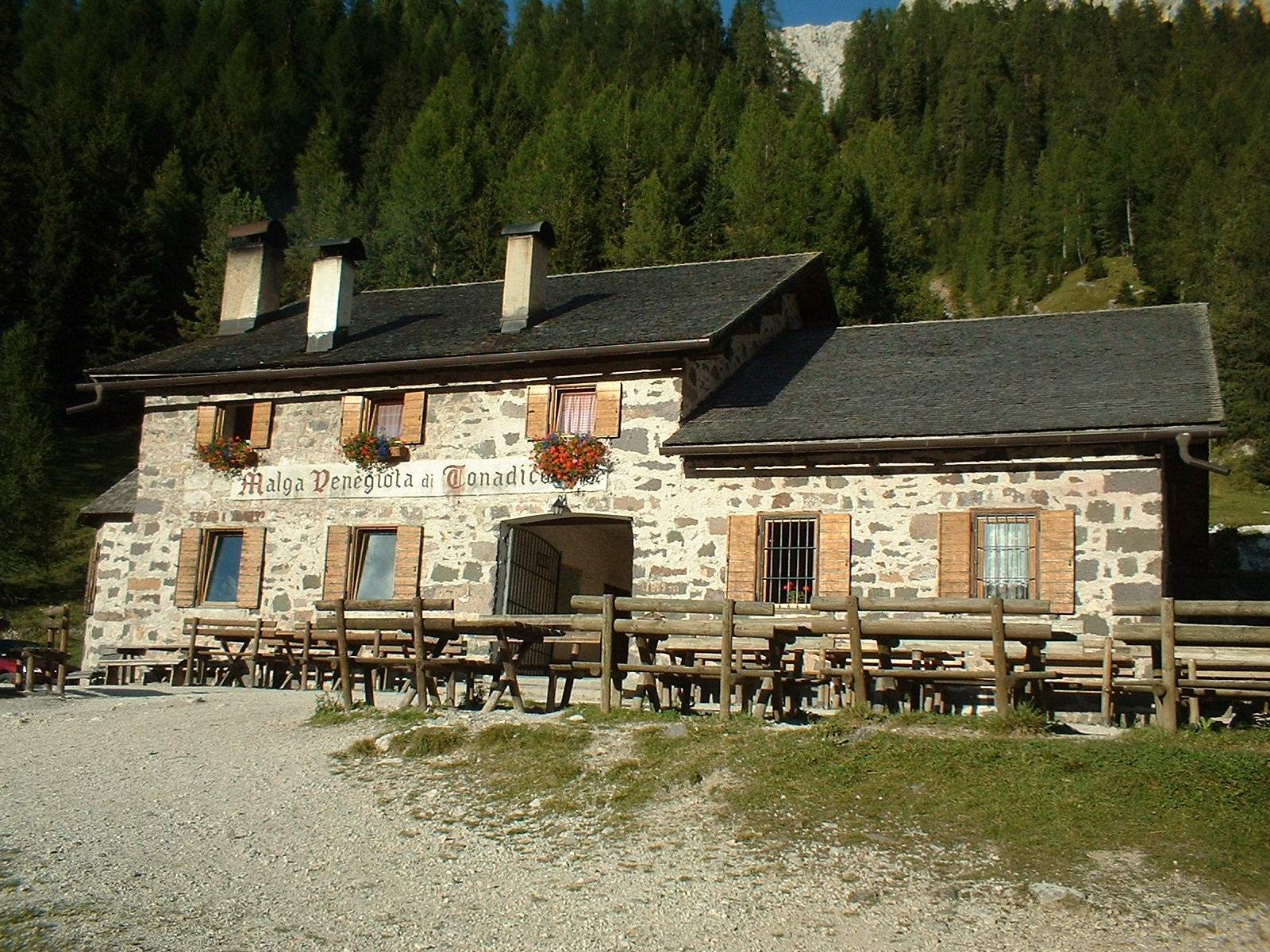 Malga Venegiota (Val Venegia - Trentino)